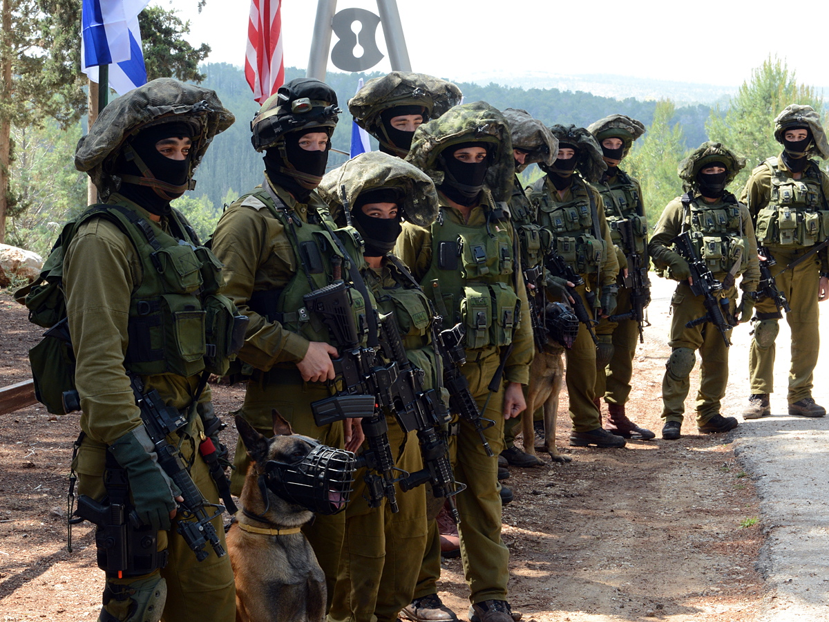 DSC_3982Oketz